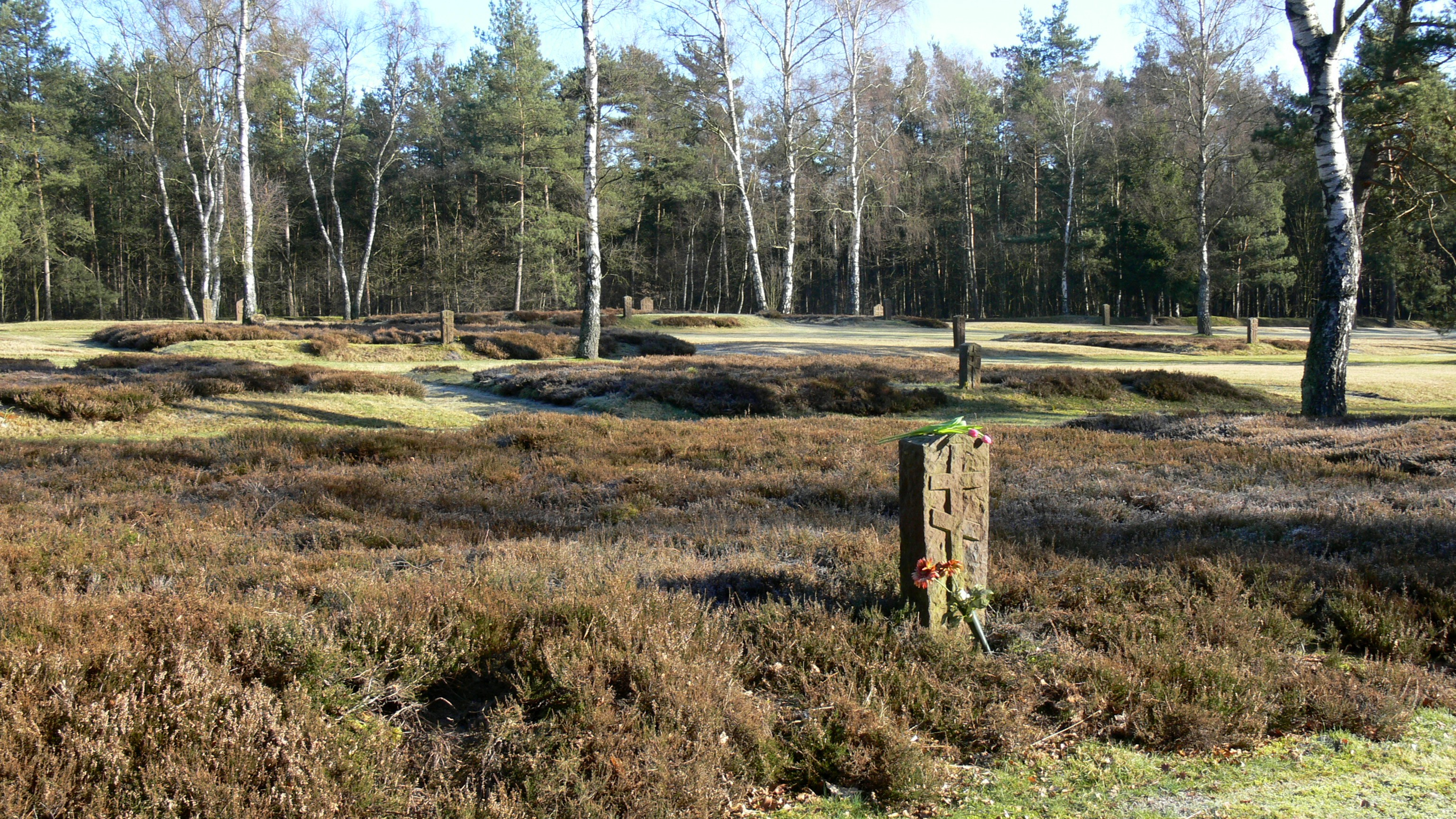 sowjet. Kriegsgräberfriedhof Belsen/Hörsten